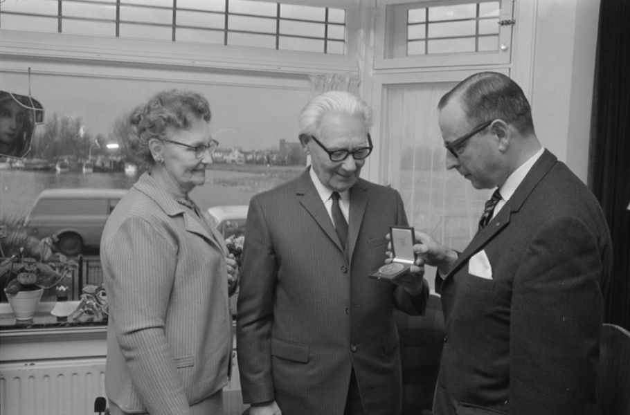 Beeldende kunstenaar Adriaan van der Plas (midden) ontvangt uit handen van mr. W.H. Fockema Andreae de penning van de Leuve.